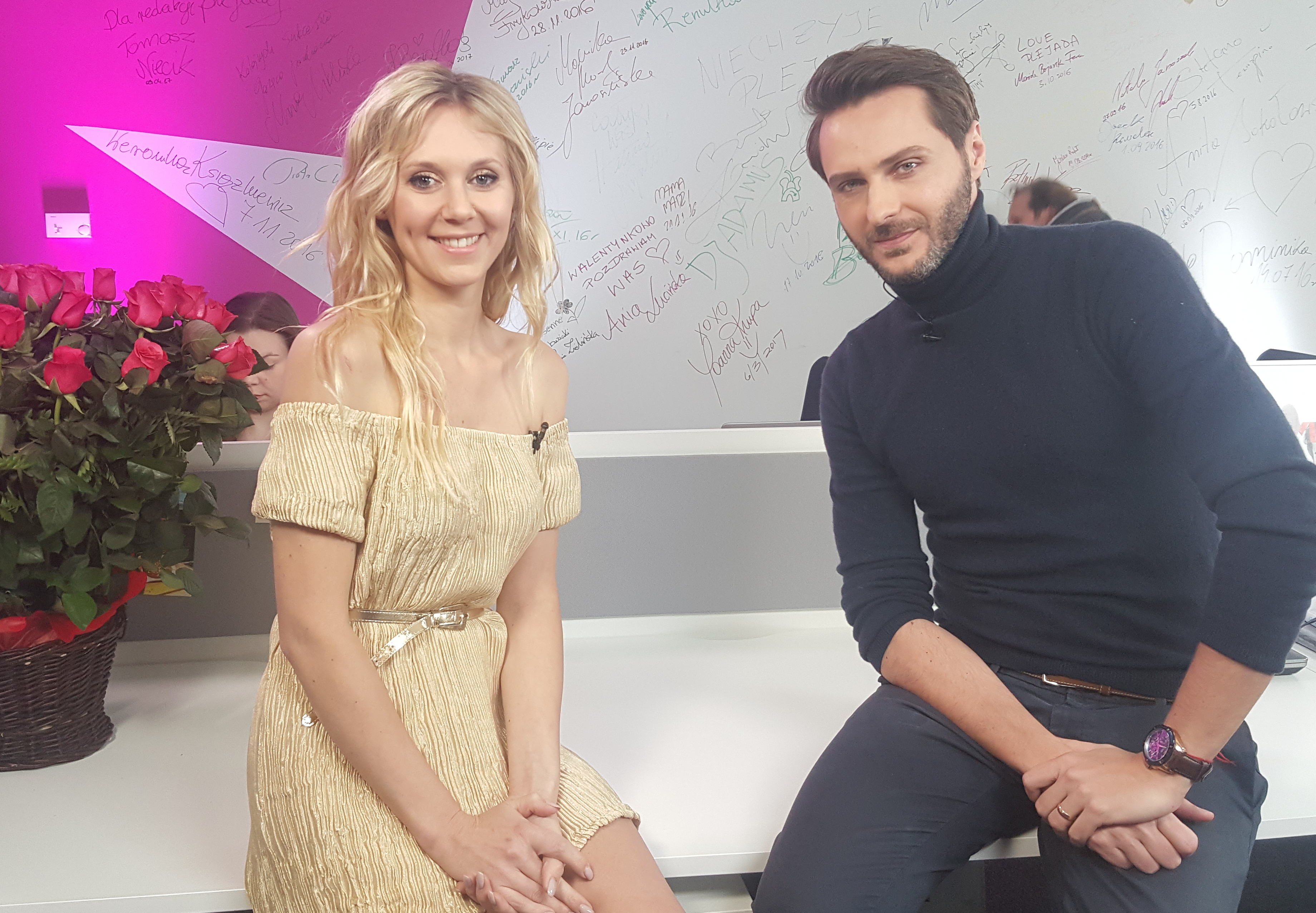 Polska piosenkarka Kasia Moś oraz dziennikarz i redaktor naczelny Plejada.pl Marcin Cejrowski na nagraniu programu "Gwiazdy Cejrowskiego".